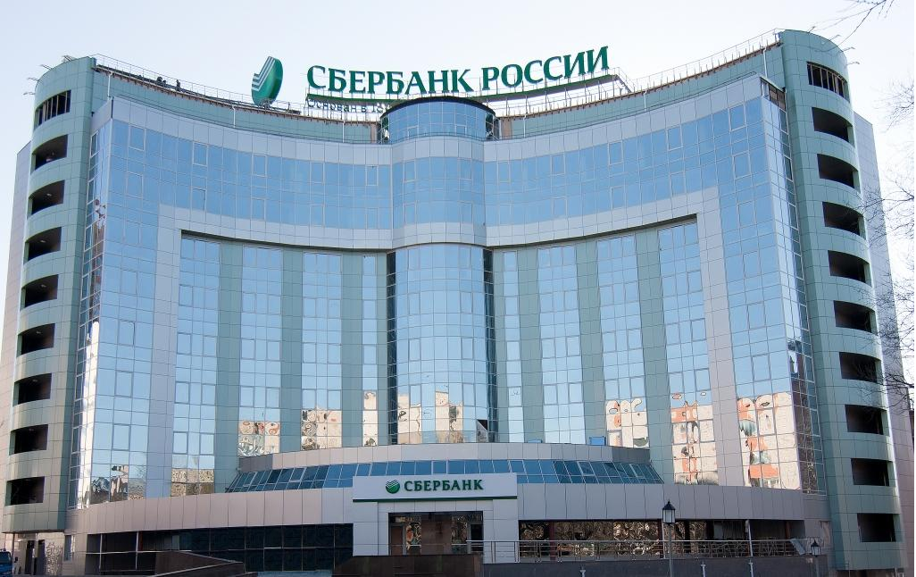 Головное здание Сбербанка в Хабаровске